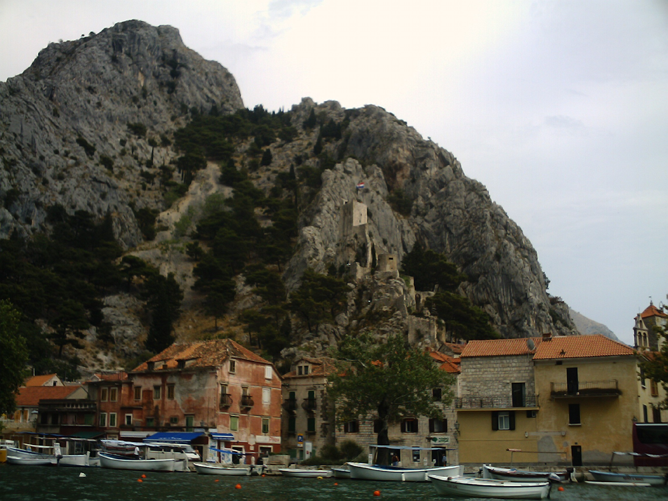 Omiš